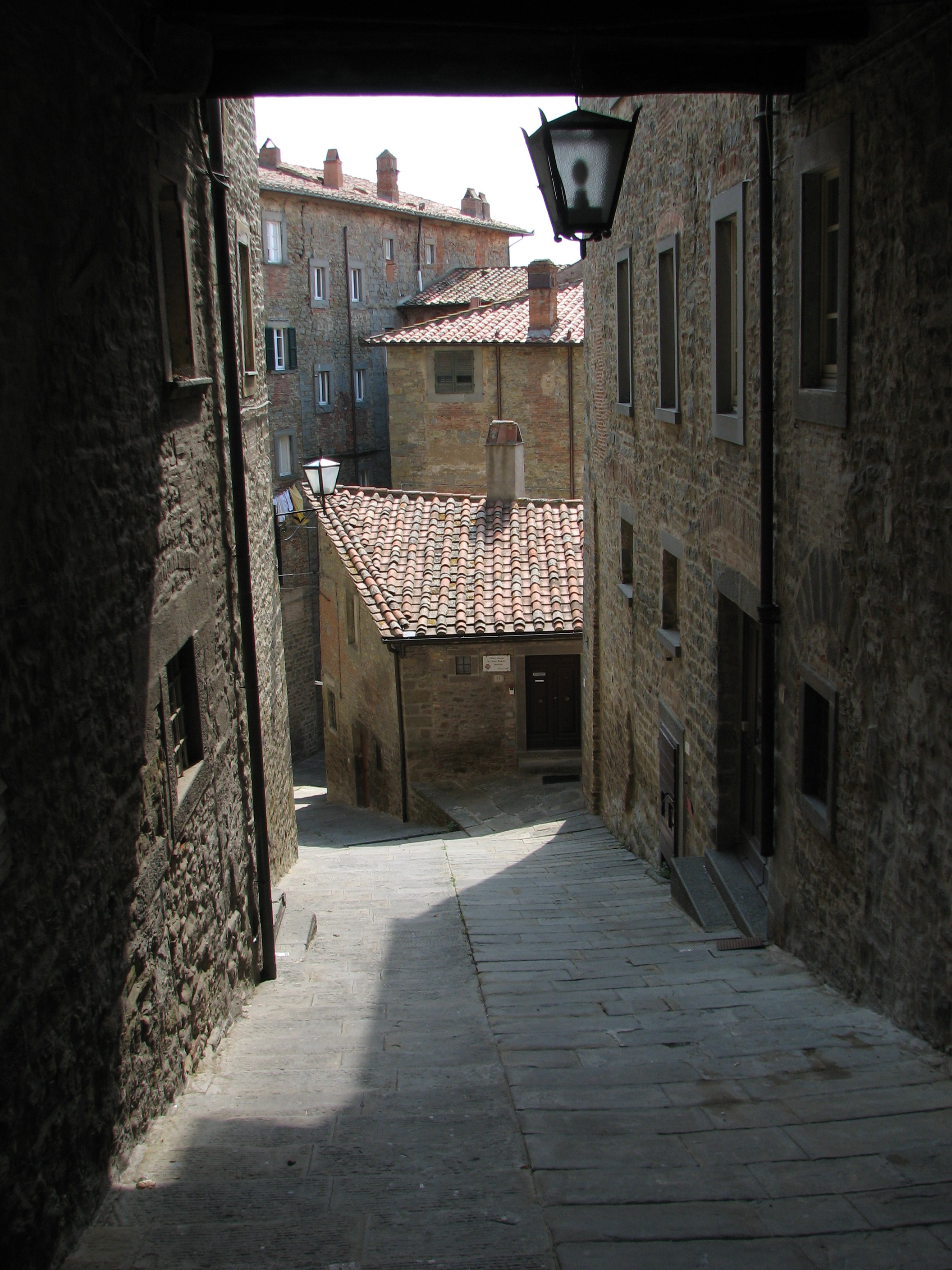 Cortona, Toscana, Italia